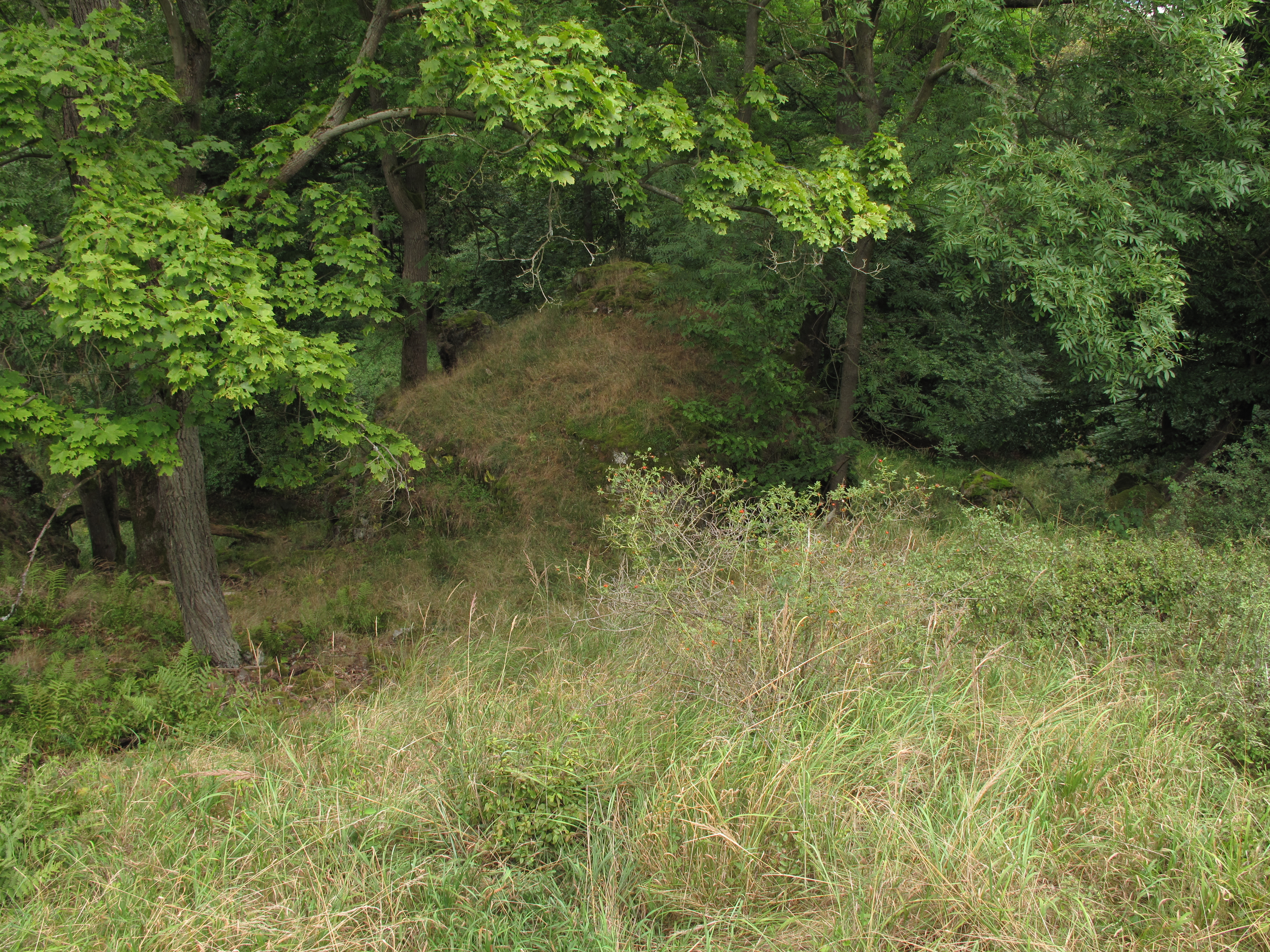 Pohled ze svahu v přírodní rezervaci Vysoký tok. Okres Rakovník, Česká republika.